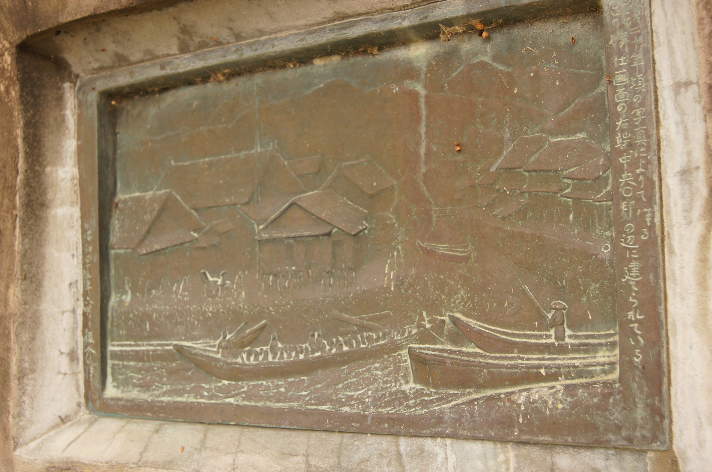 長野県松本市巾上の女鳥羽川と道路の間にある犀川通船碑のうち昔の写真を元にしたレリーフ